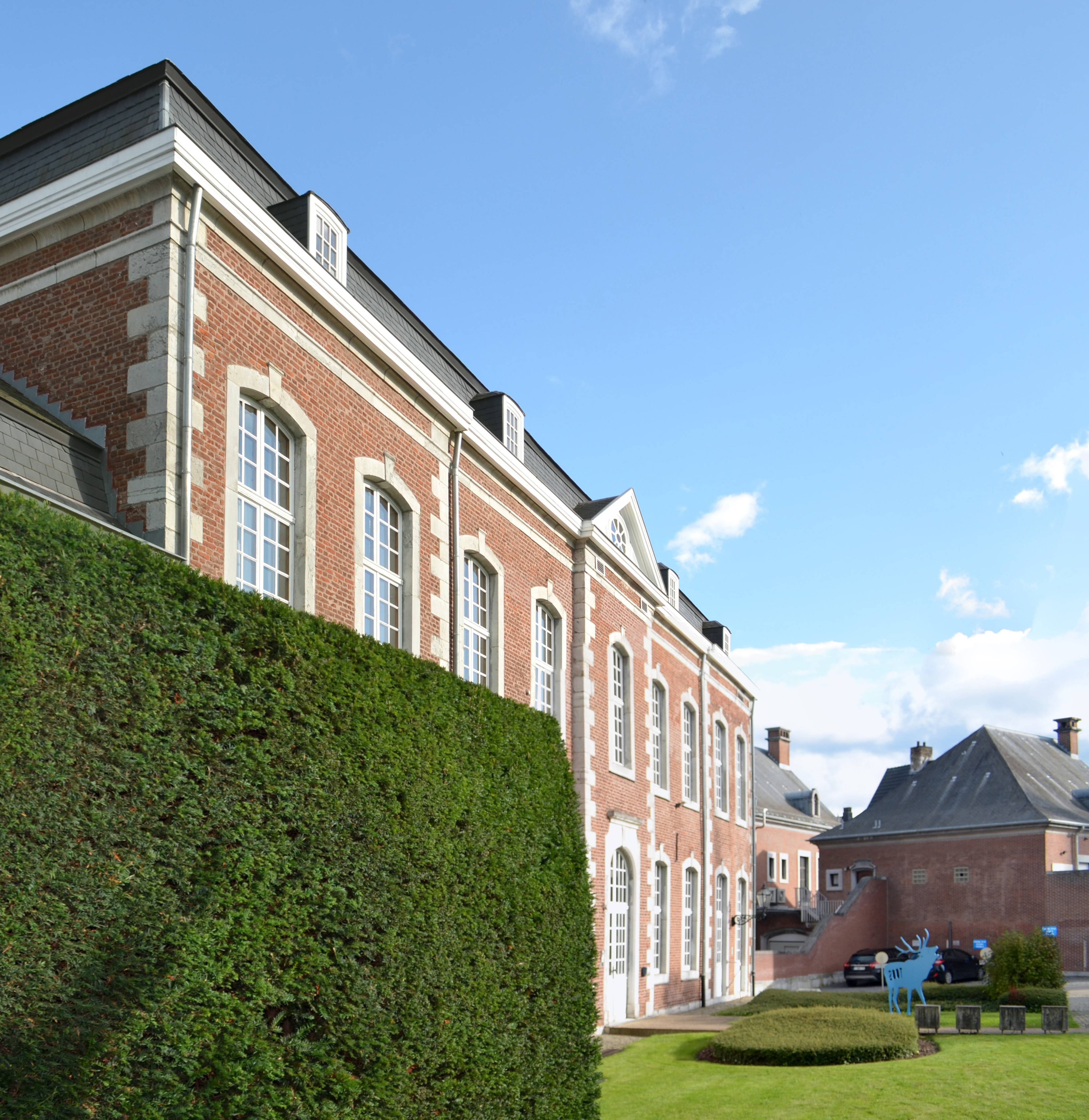 Haus Grand Ry in Eupen, Rückseite